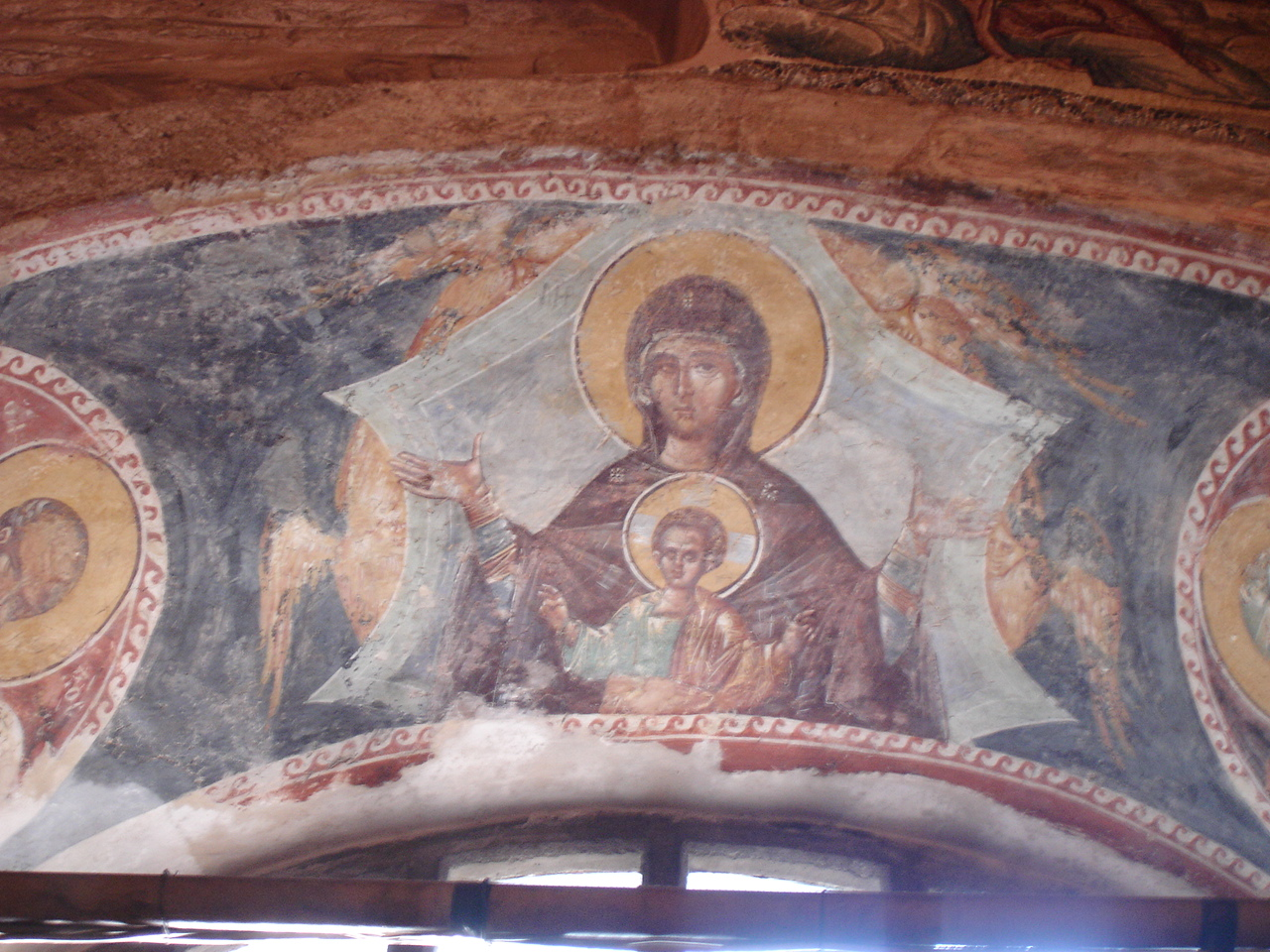 Istanbul: Museo di San Salvatore in Chora (Kariye Cami) - Parecclesion (cappella funeraria). Abside, affresco raffigurante la Madonna col bambino. Foto di: Giovanni Dall'Orto, 29-5-2006.